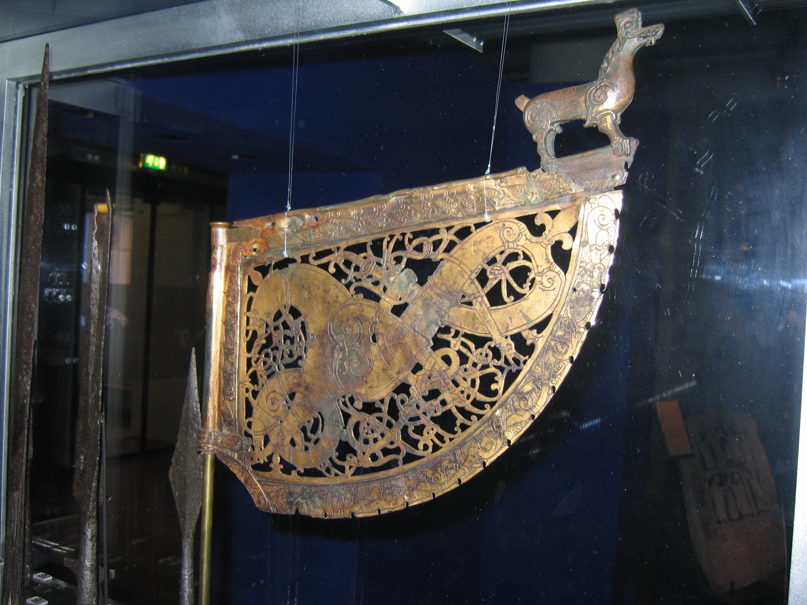 Viking weather vane